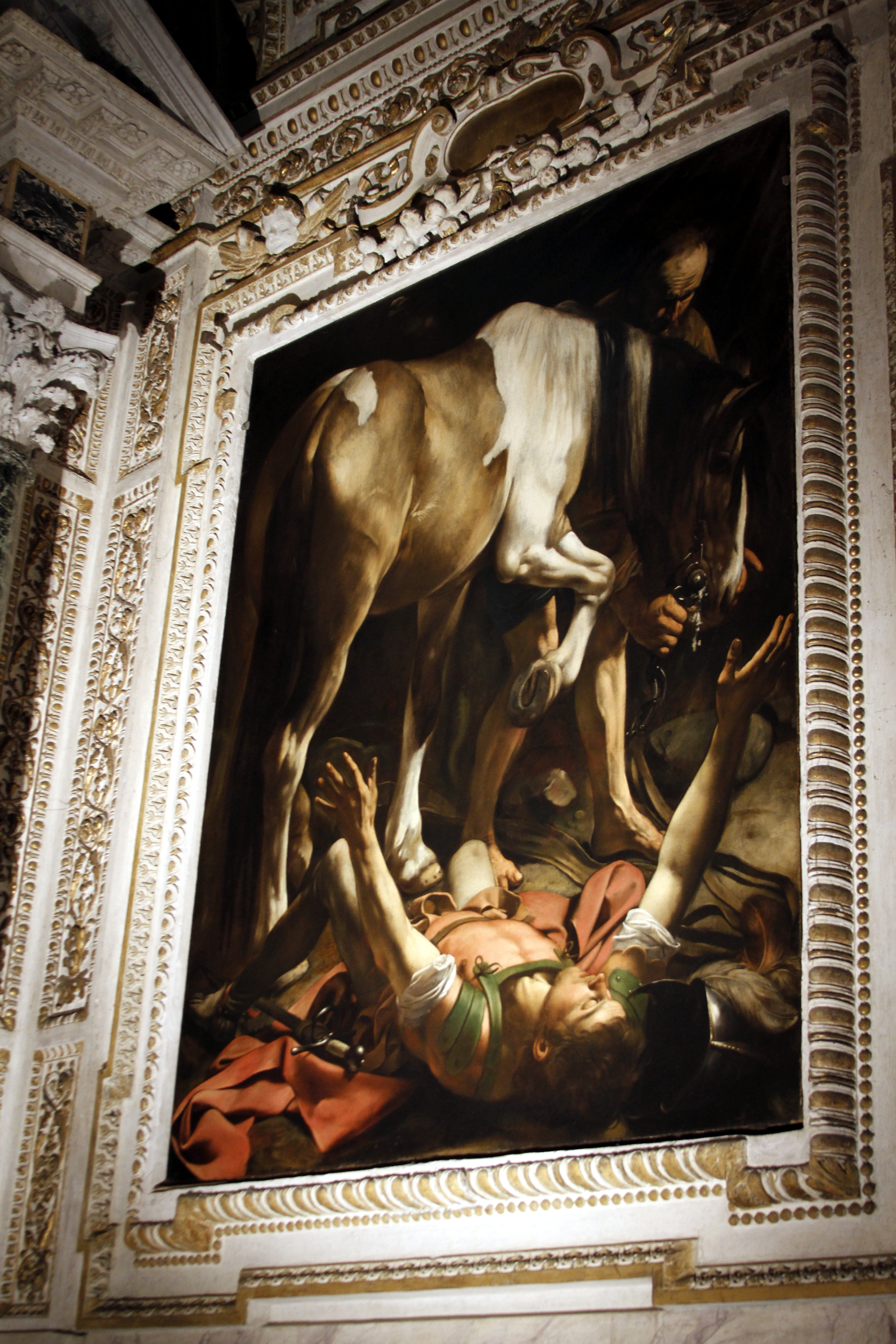 Santa Maria del Popolo - Rome